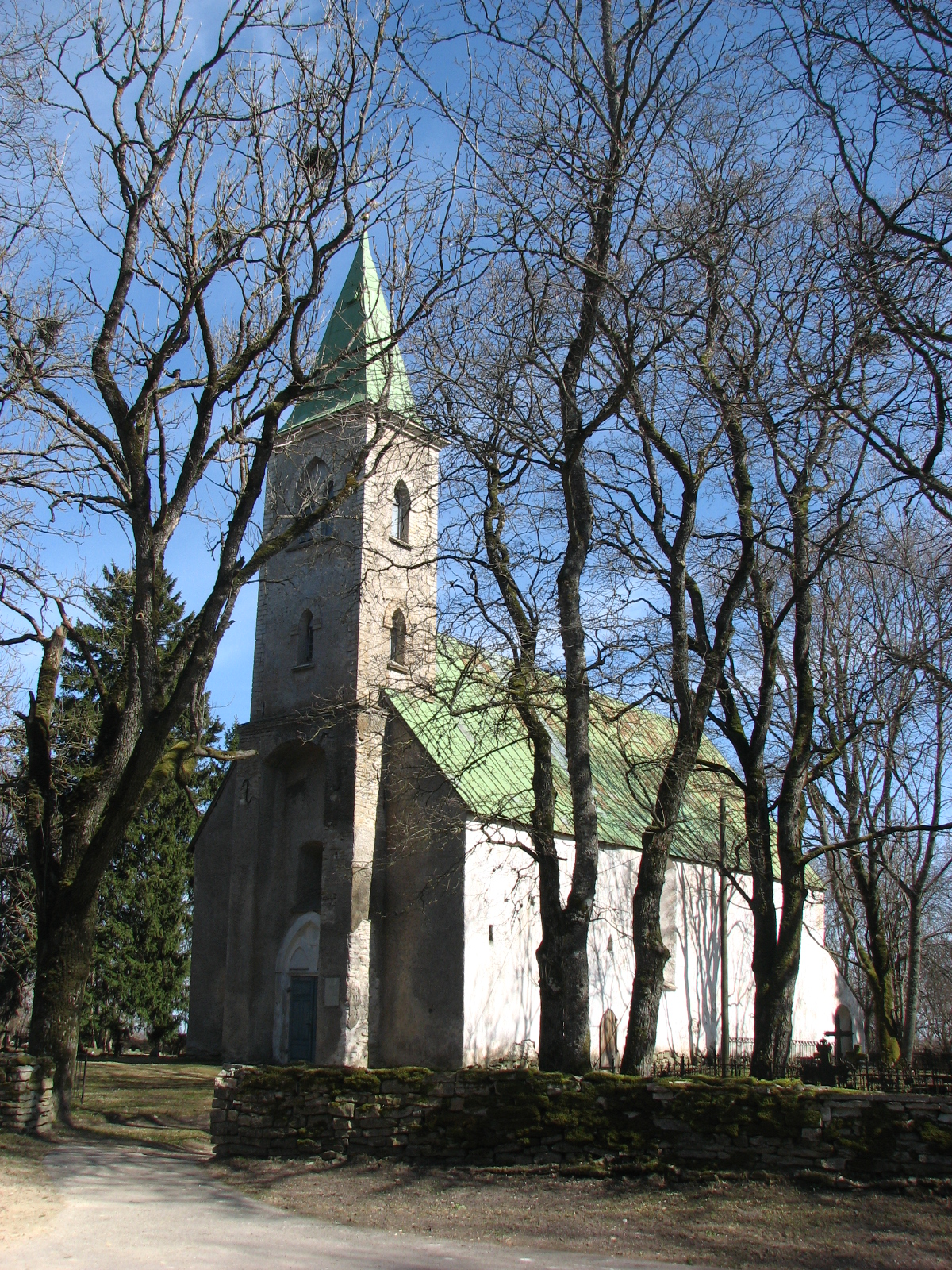 Kirbla Püha Nikolause kirik